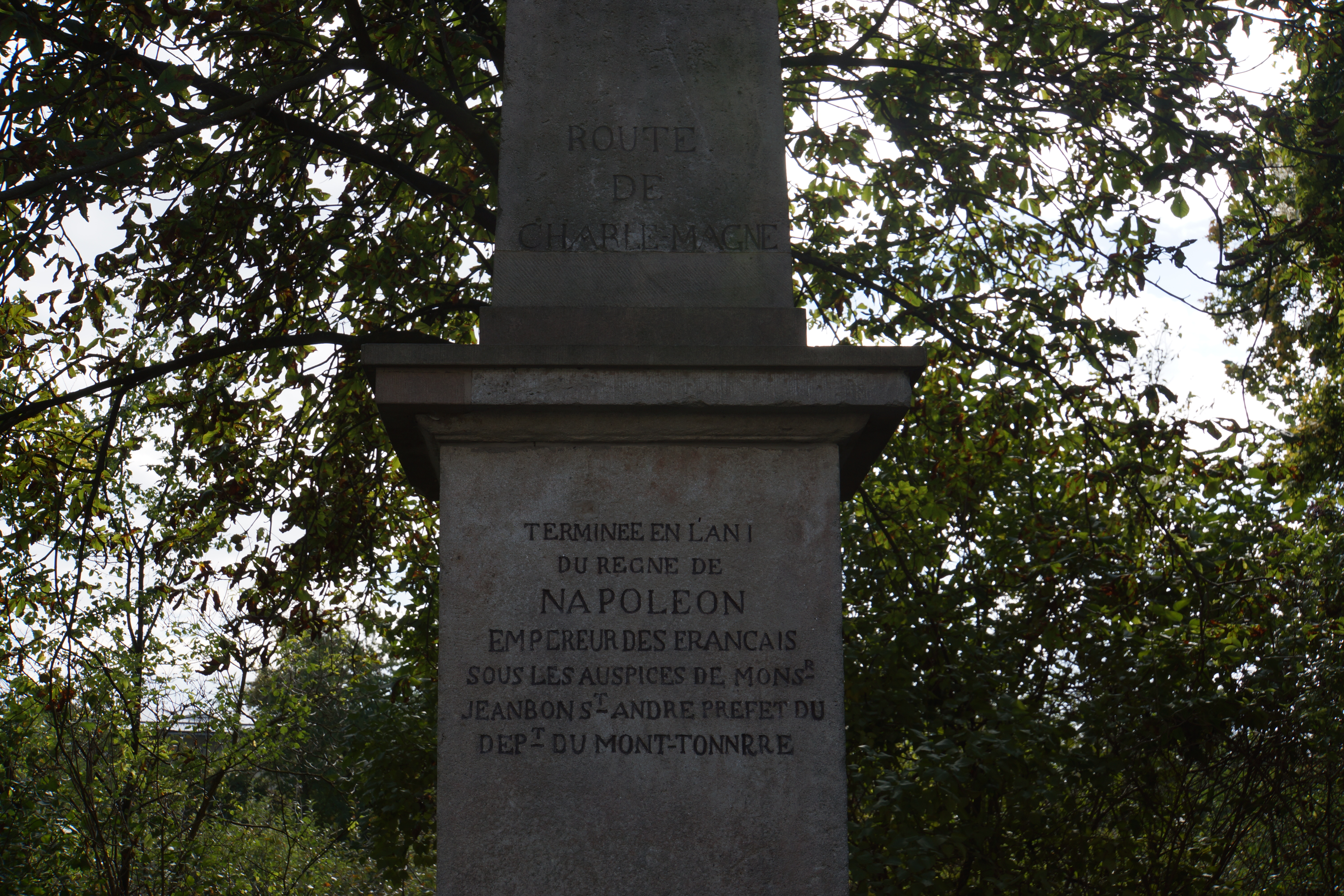 Obelisk Route Charlemagne Ingelheim